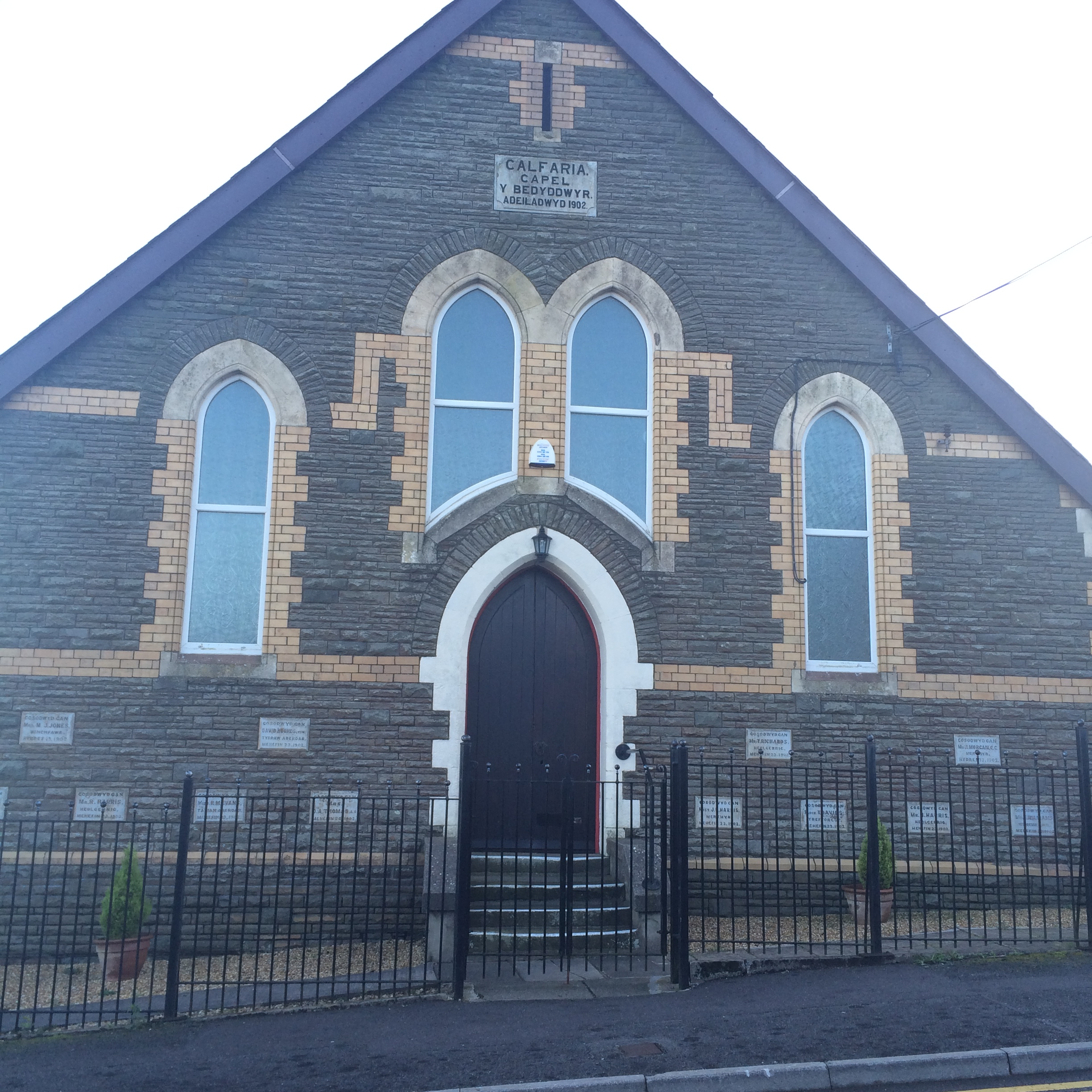 Capel Calfaria ym mhentref Heolgerrig, Merthyr Tudful.